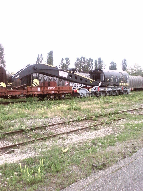 Grue de 85 t de la SNCF (GV581 renommée en GD581) construite dans les ateliers Cockerill à Seraing.N° UIC: Ua 80 87 974 75007W